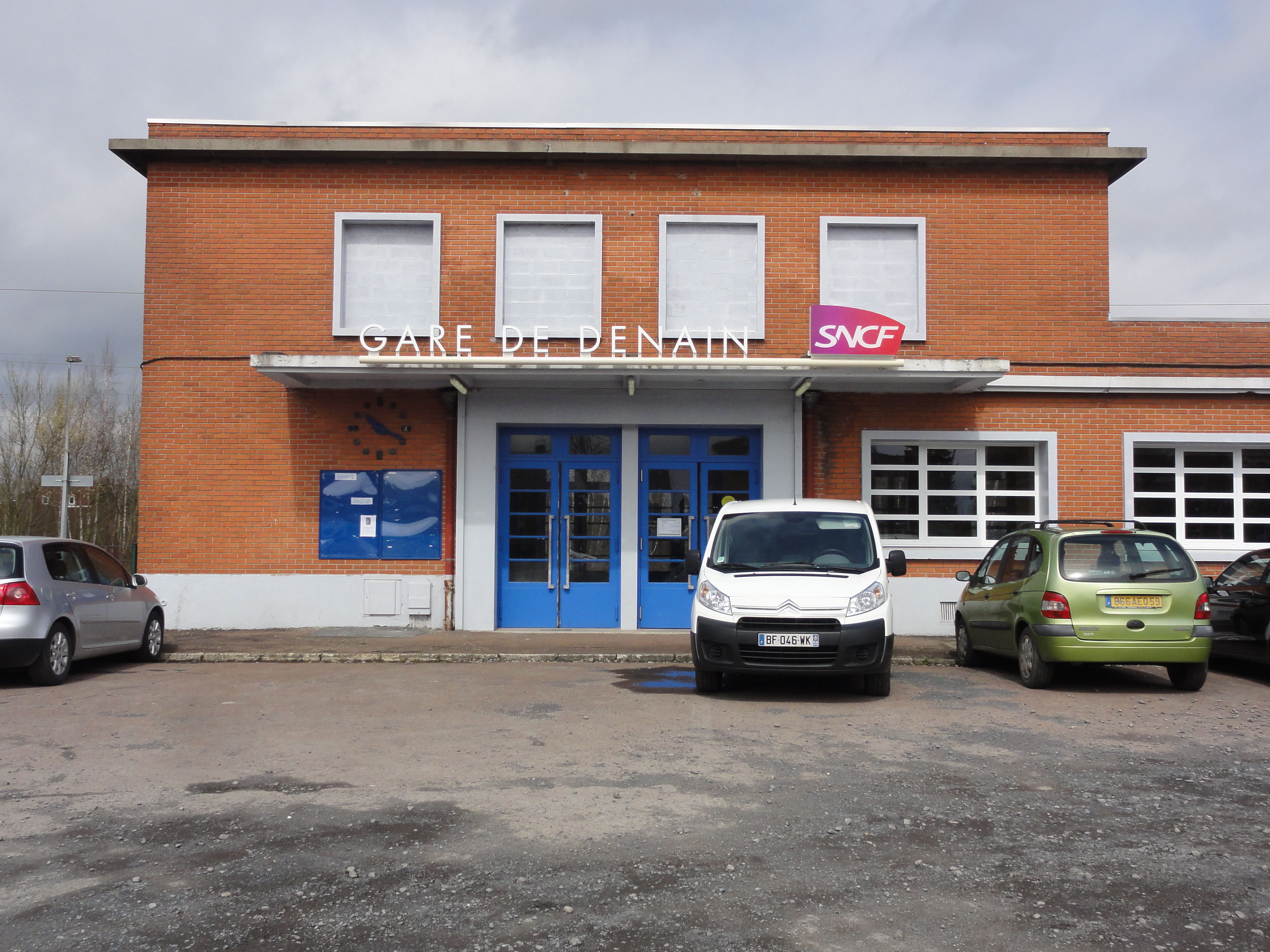 Gare de Denain, Nord, Nord-Pas-de-Calais, France.